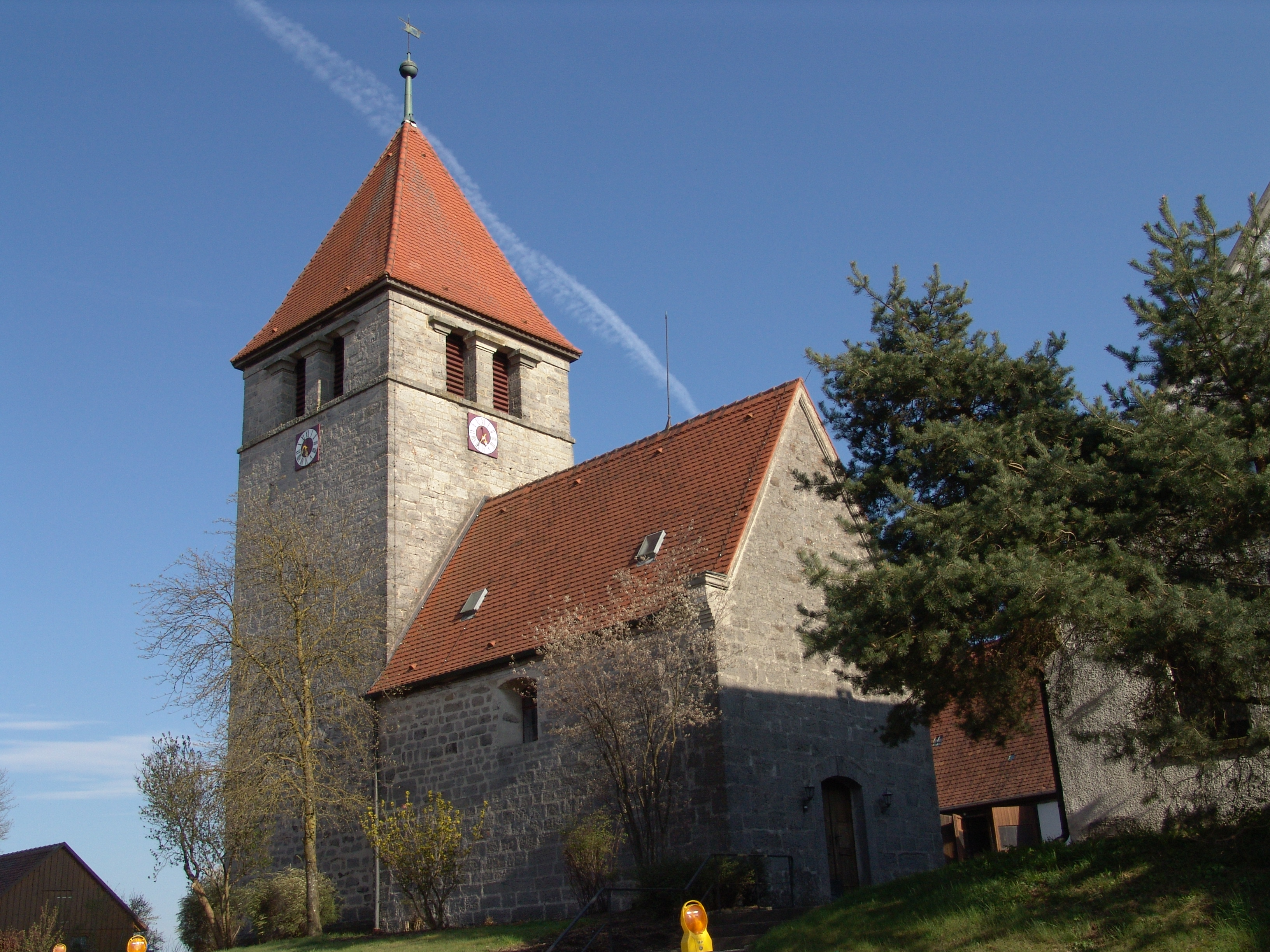 evang.-luth. Kirche St. Maria in Ostheim evang.-luth. Kirche St. Nikolaus in Zwernberg